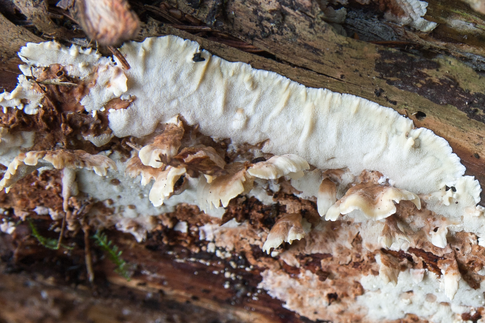 Antrodiella pallasii